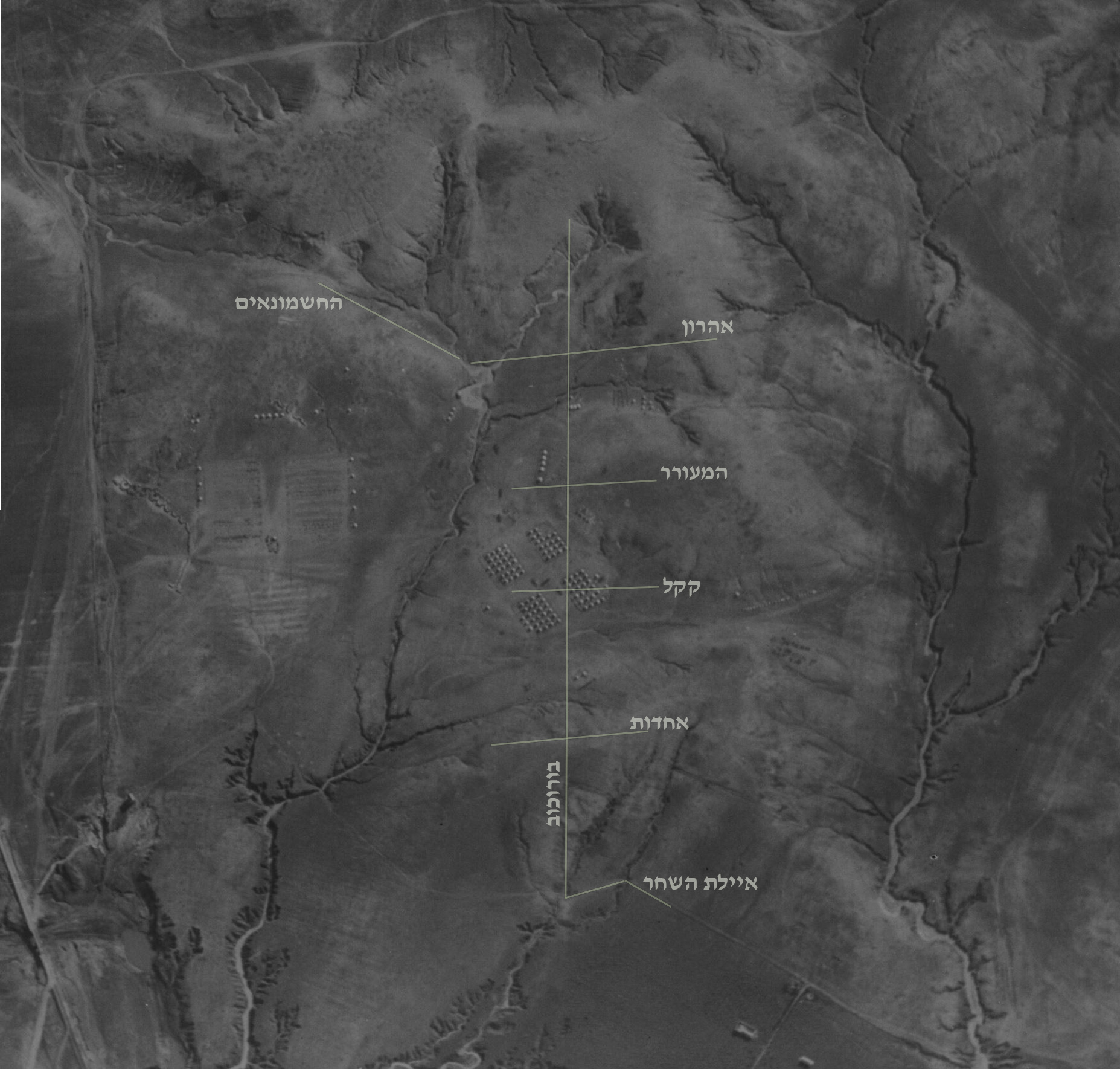 תצ"א שצולם ב-1918 על ידי הטייסת הבווארית 30. בתמונה תוואי השטח בו הוקמה שכונת בורוכוב, גבעתיים. למען התמצאות סומנו המיקומים העתידיים של הרחובות המודרניים.